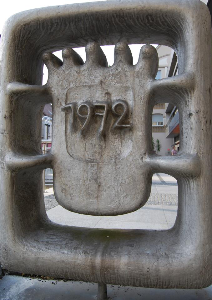 Wappenrelief am 1972 errichteten Gebäude der staatlichen Kurverwaltung im Staatsbad Bad Kissingen (Am Kurgarten)